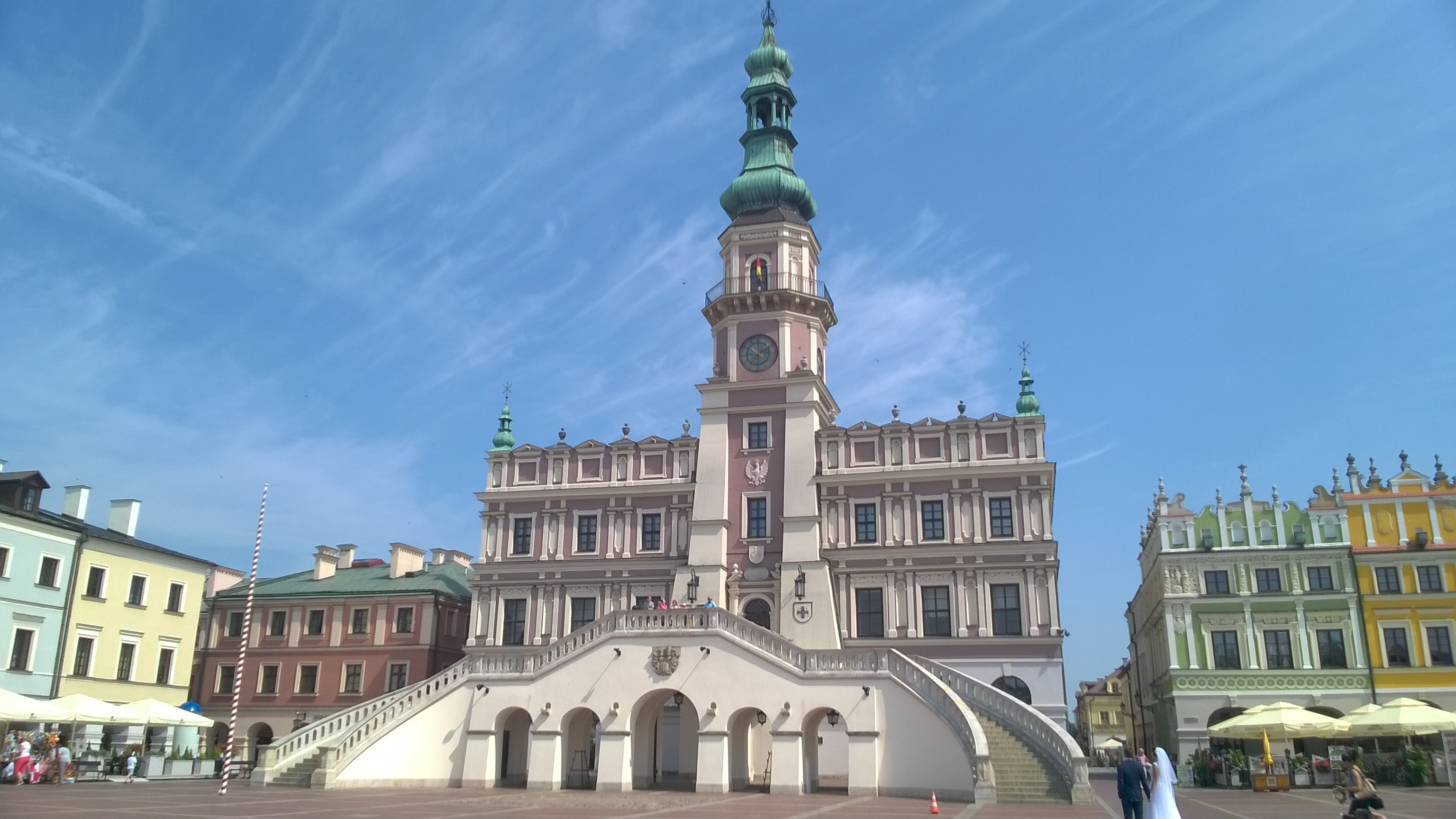 Zamość, Ratusz w Zamościu Wikidata has entry Q9304627 with data related to this item.